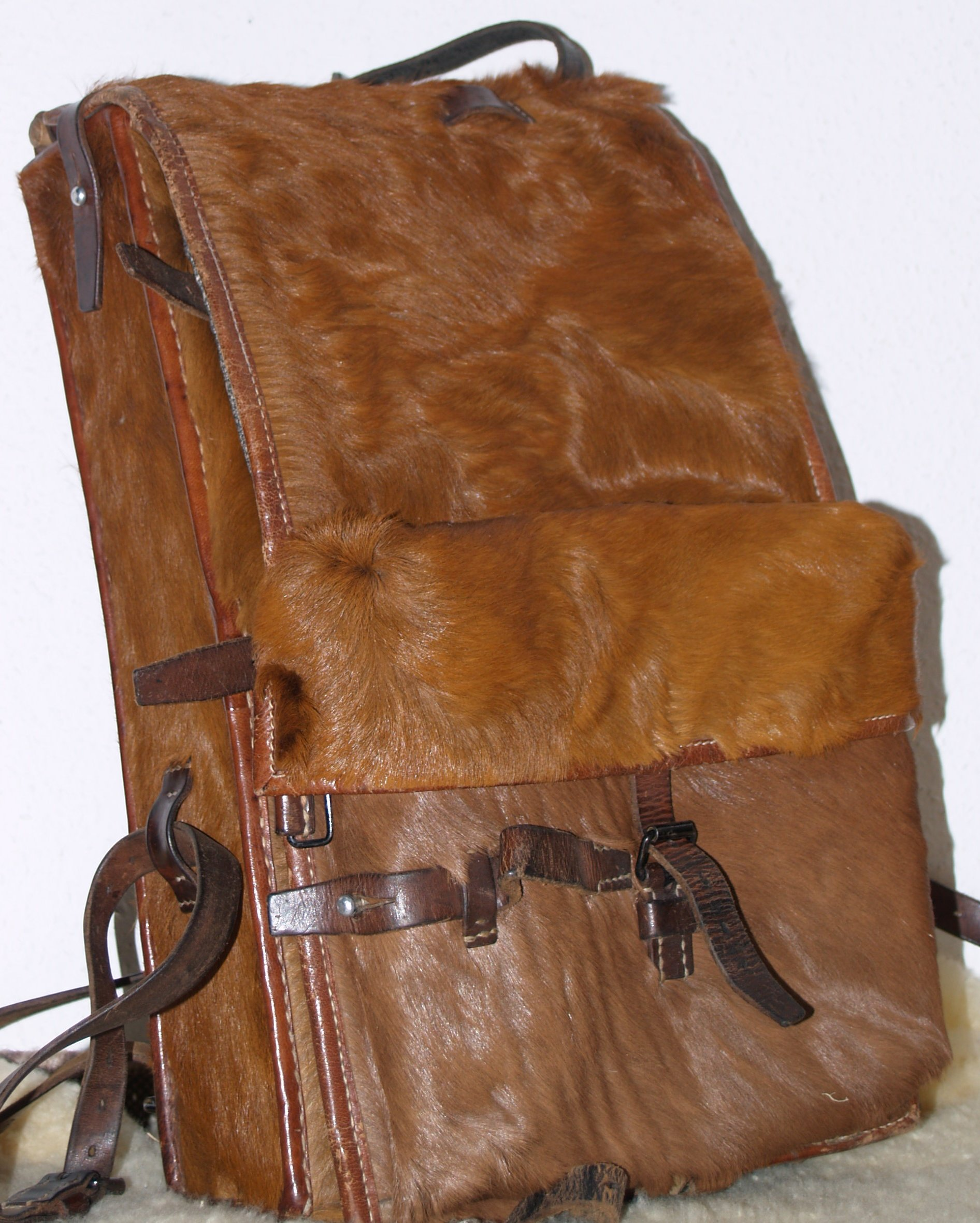 Rechteckiger Schweizer Tornister aus Kalbfell (auch: Affe / Fellaff)